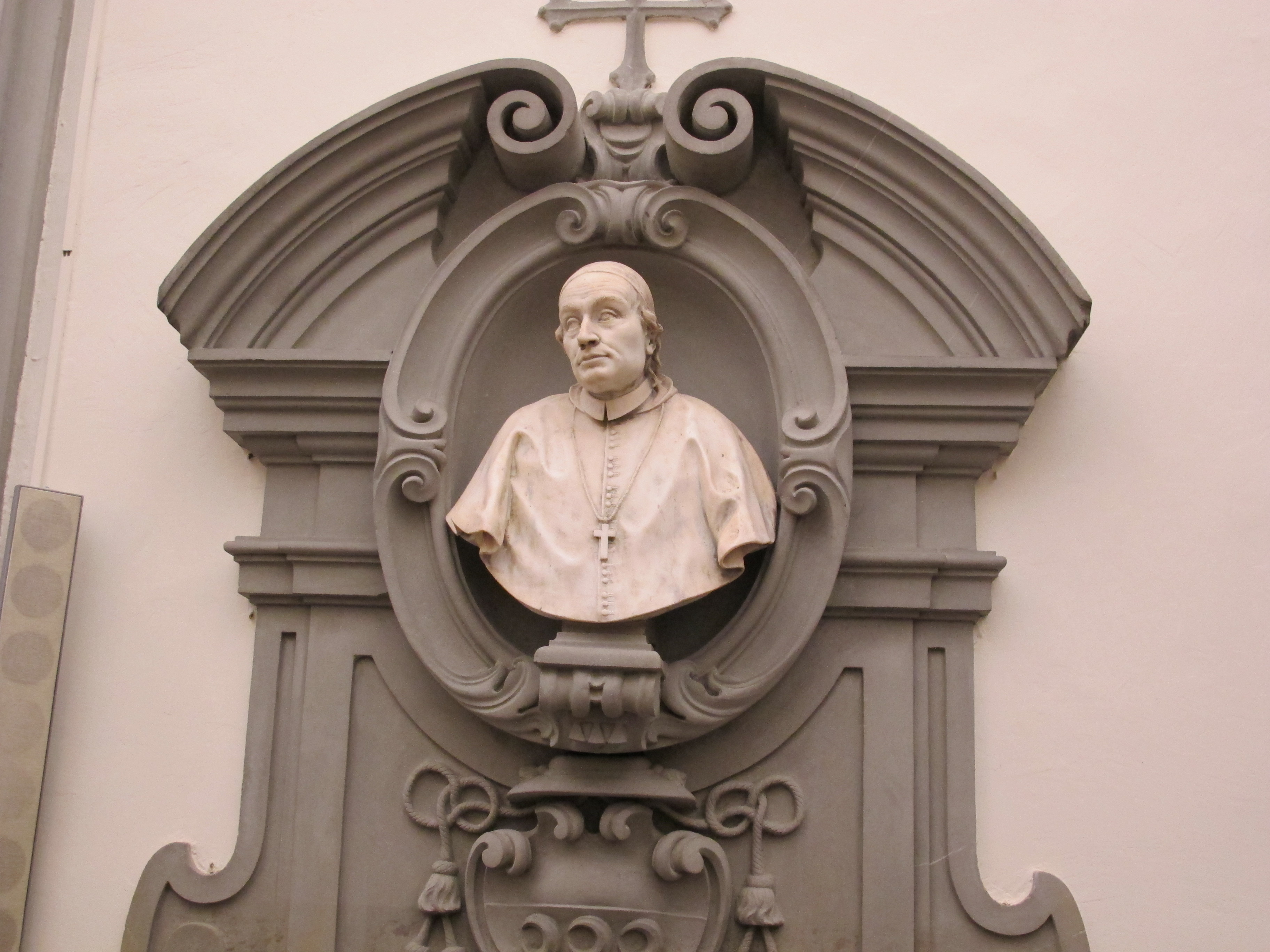 Santa maria in campo, tomba del vescovo luigi maria strozzi 022.JPG